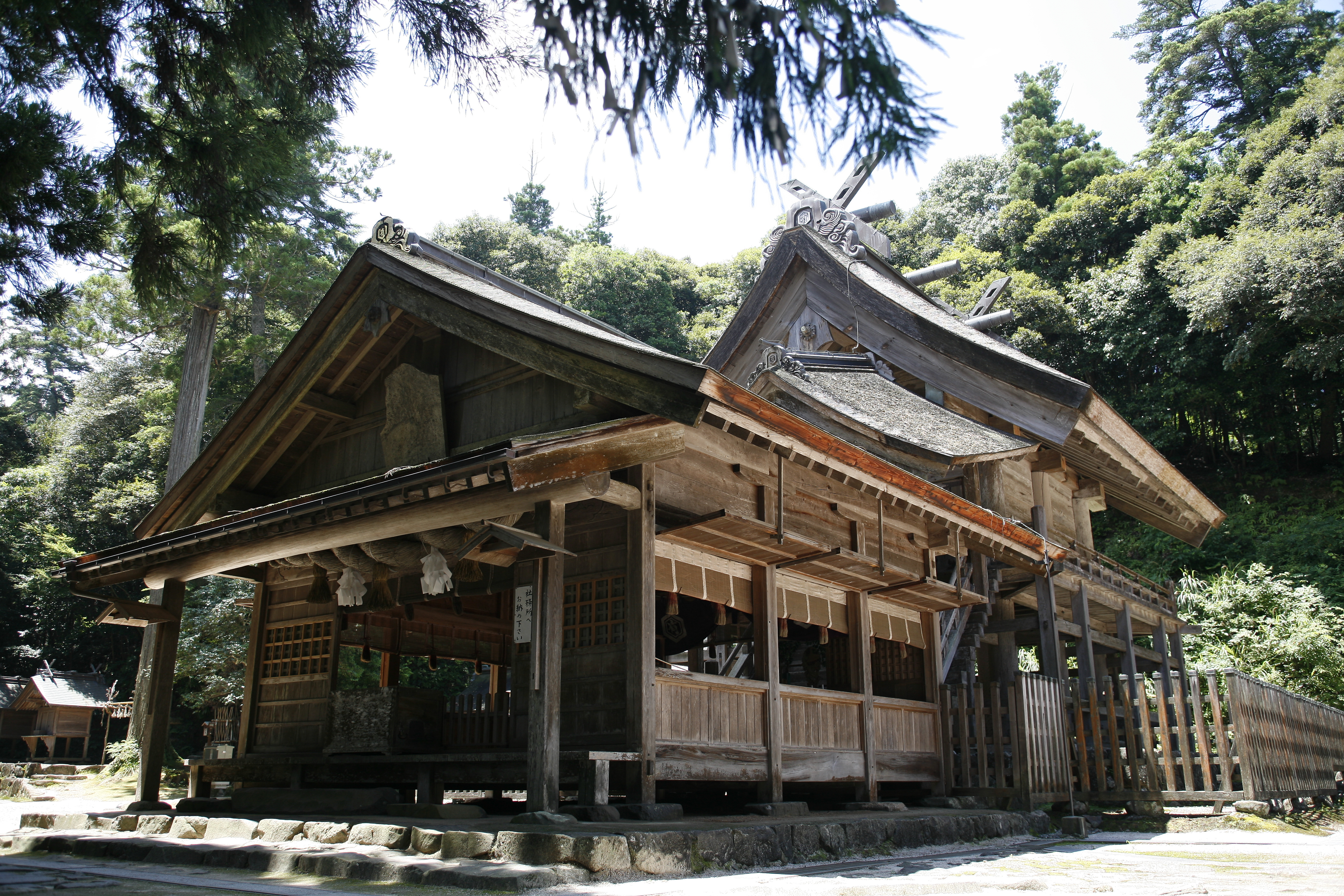 Kamosu Shrine in Matsue, Japan - 松江市の神魂神社1